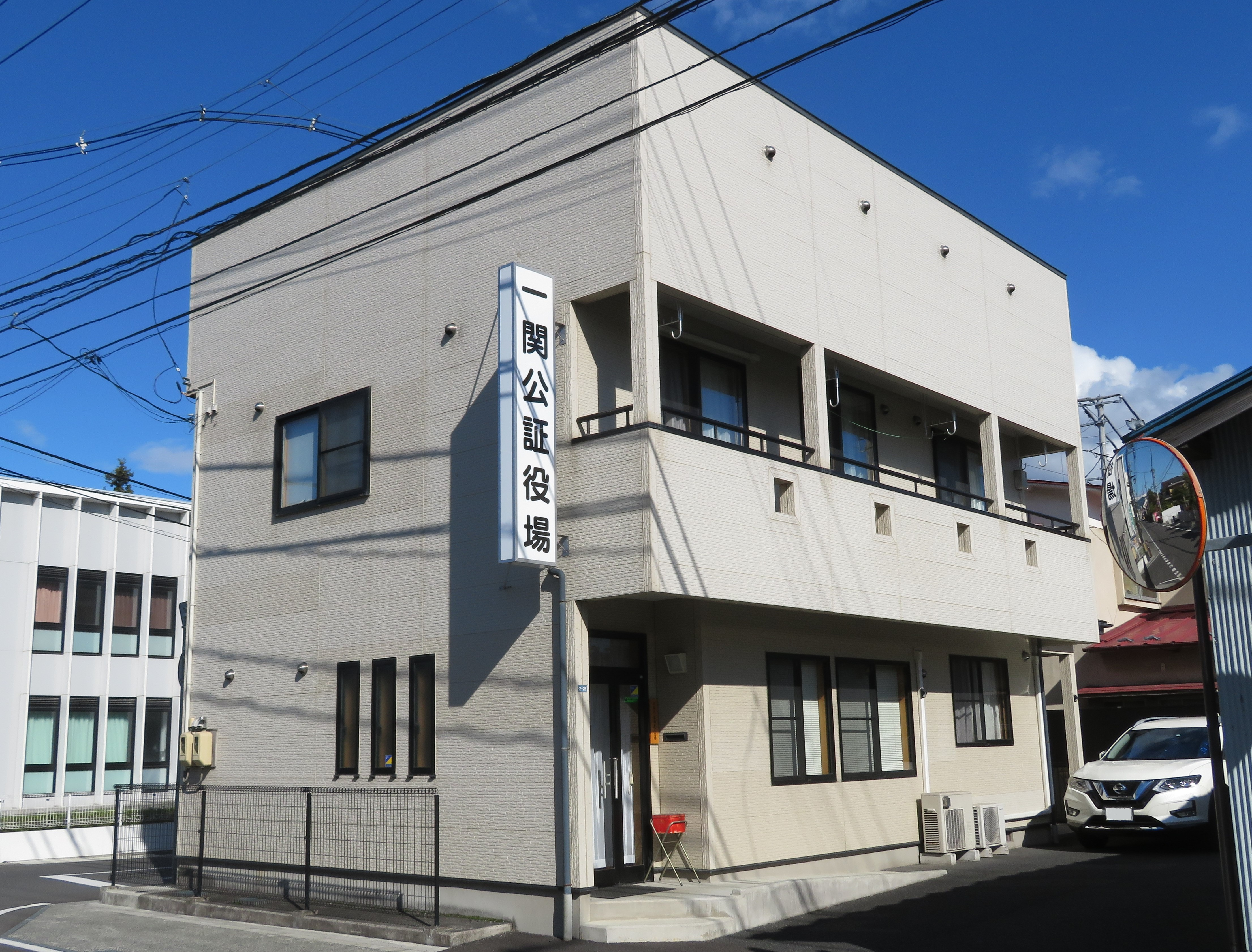 岩手県一関市に所在する一関公証役場 Canon PowerShot SX720 HS